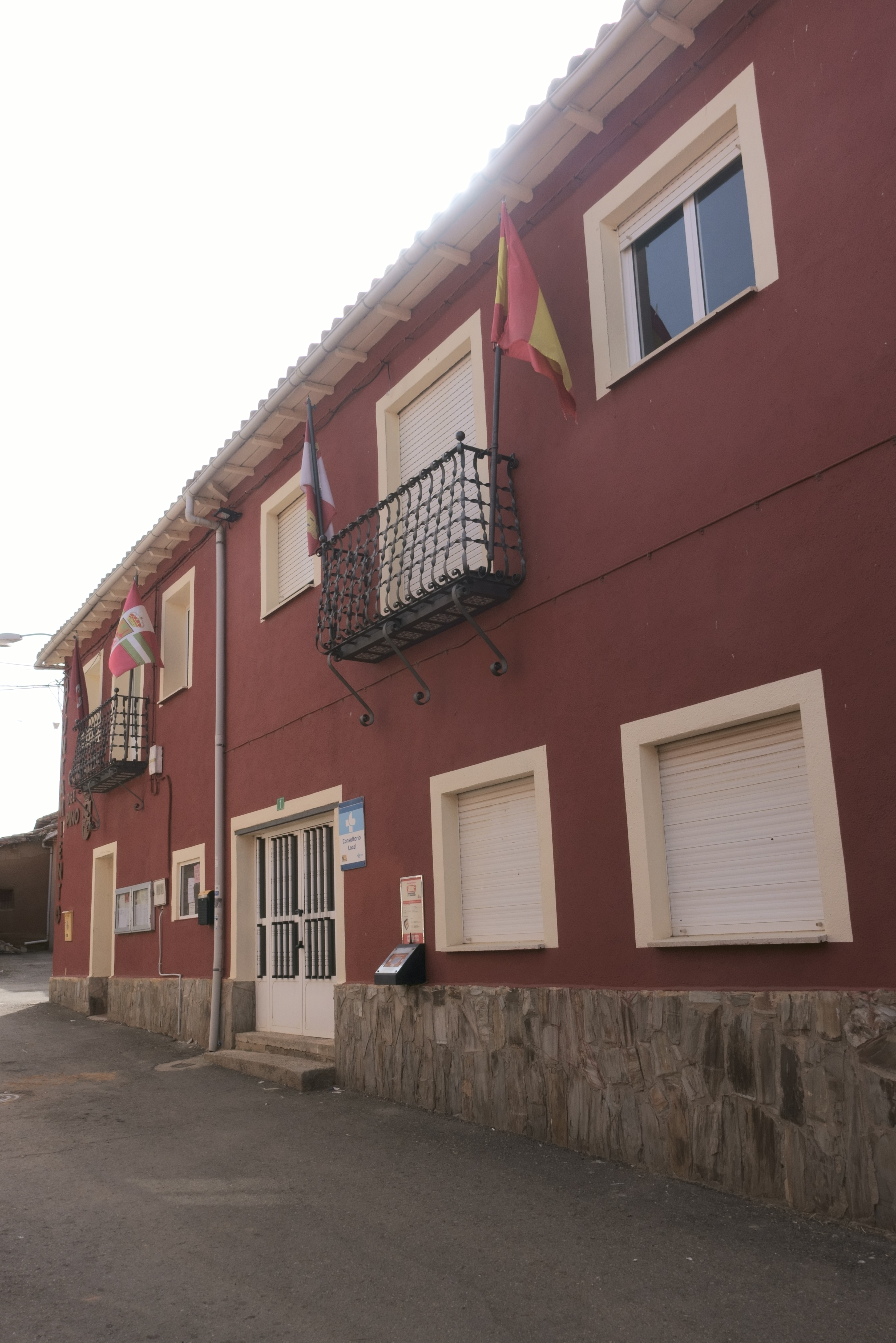 Casa consistorial de Gordaliza del Pino (León, España).